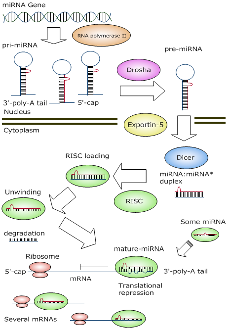 miRNAの生合成と翻訳反応抑制のモデル